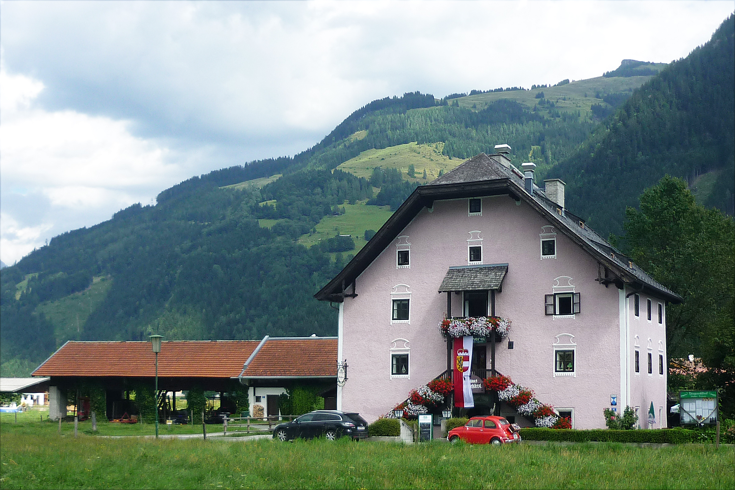 Stiegerschlössl in Maishofen Object location47° 21′ 40″ N, 12° 48′ 29.23″ E